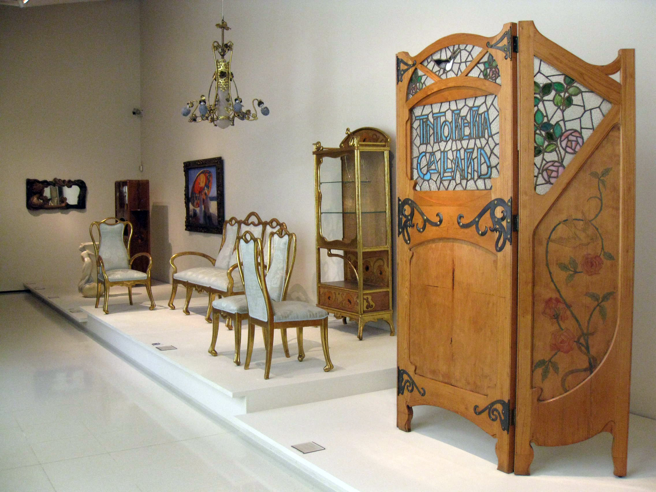 Palau Nacional (Barcelona)